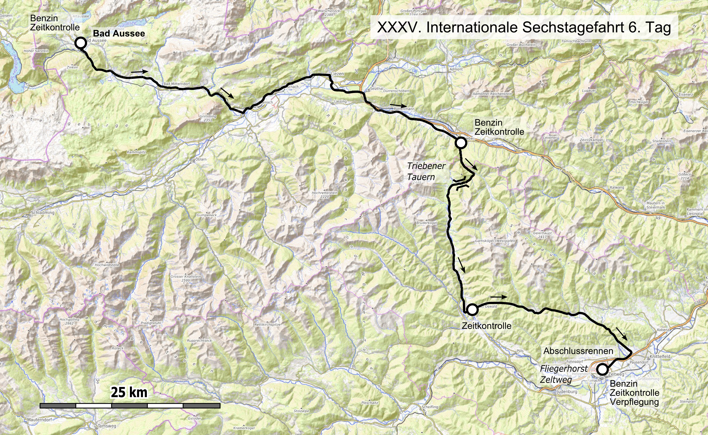 Karte der 35. Internationale Sechstagefahrt, Route des 6. Tages